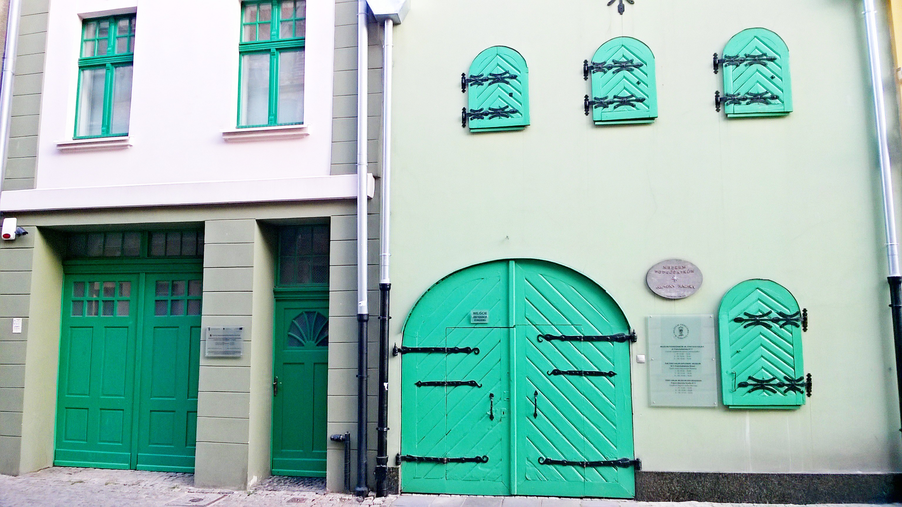 Muzeum Podróżników w Toruniu2